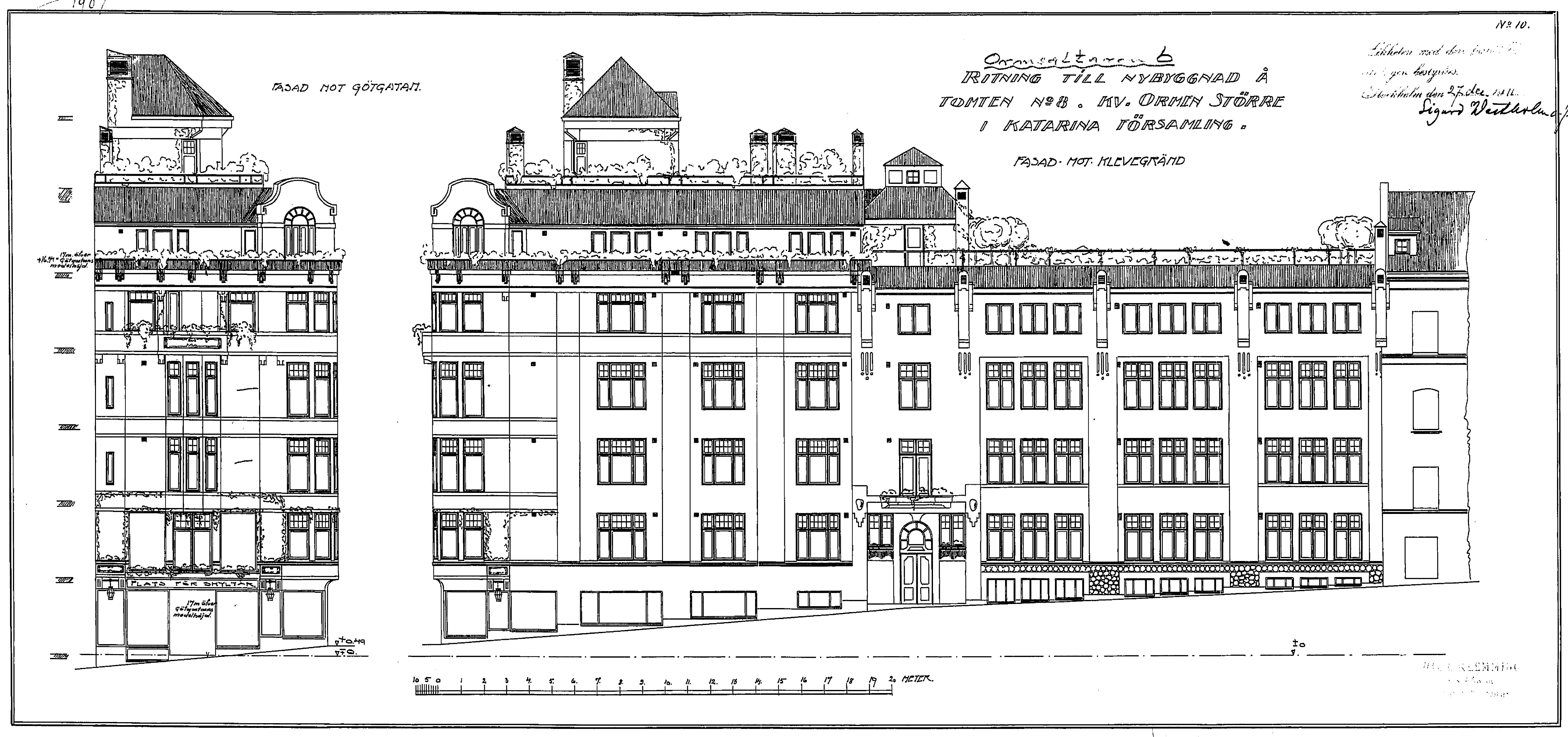 Fasadritning till Götgatan 7